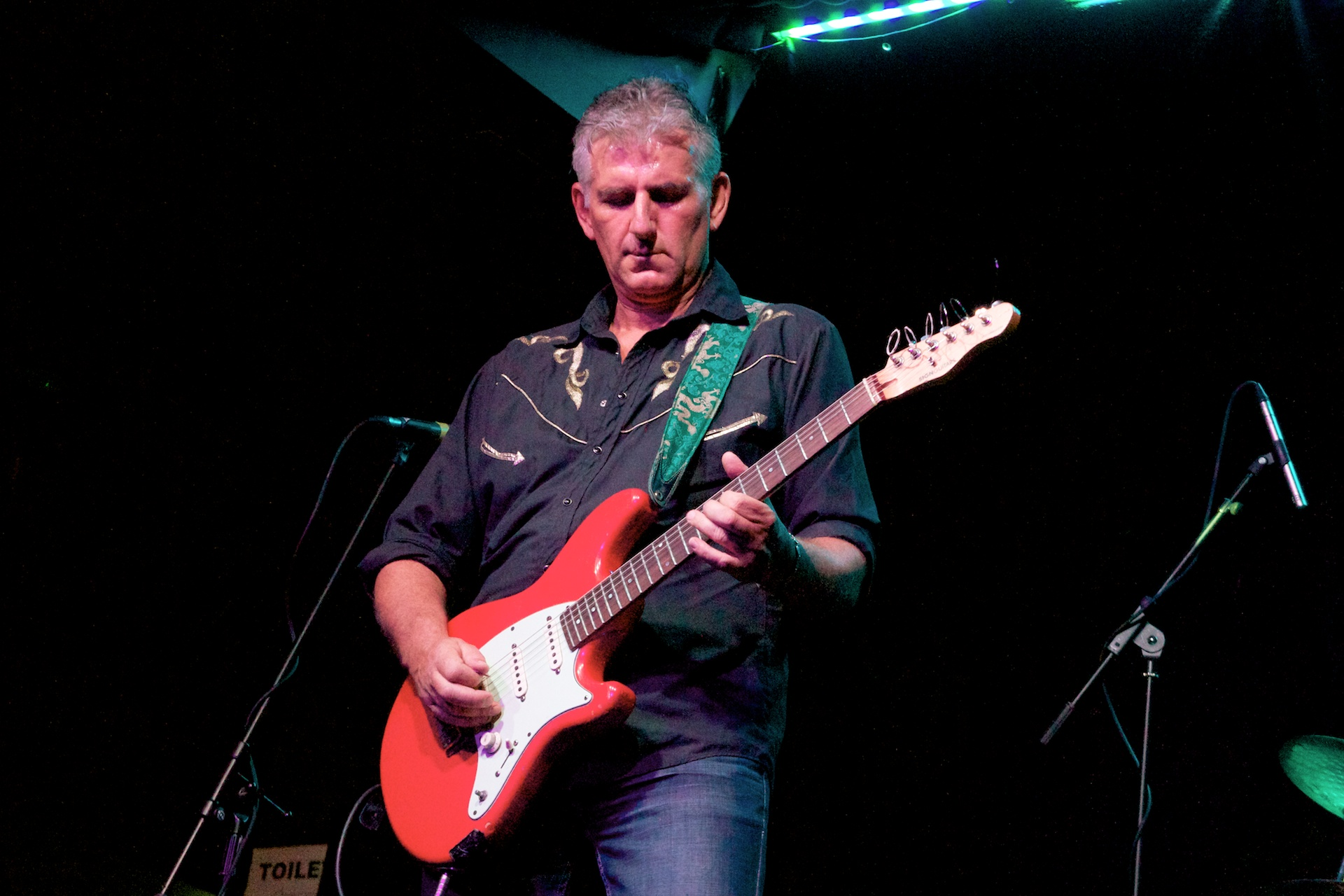 Rob Tognoni.